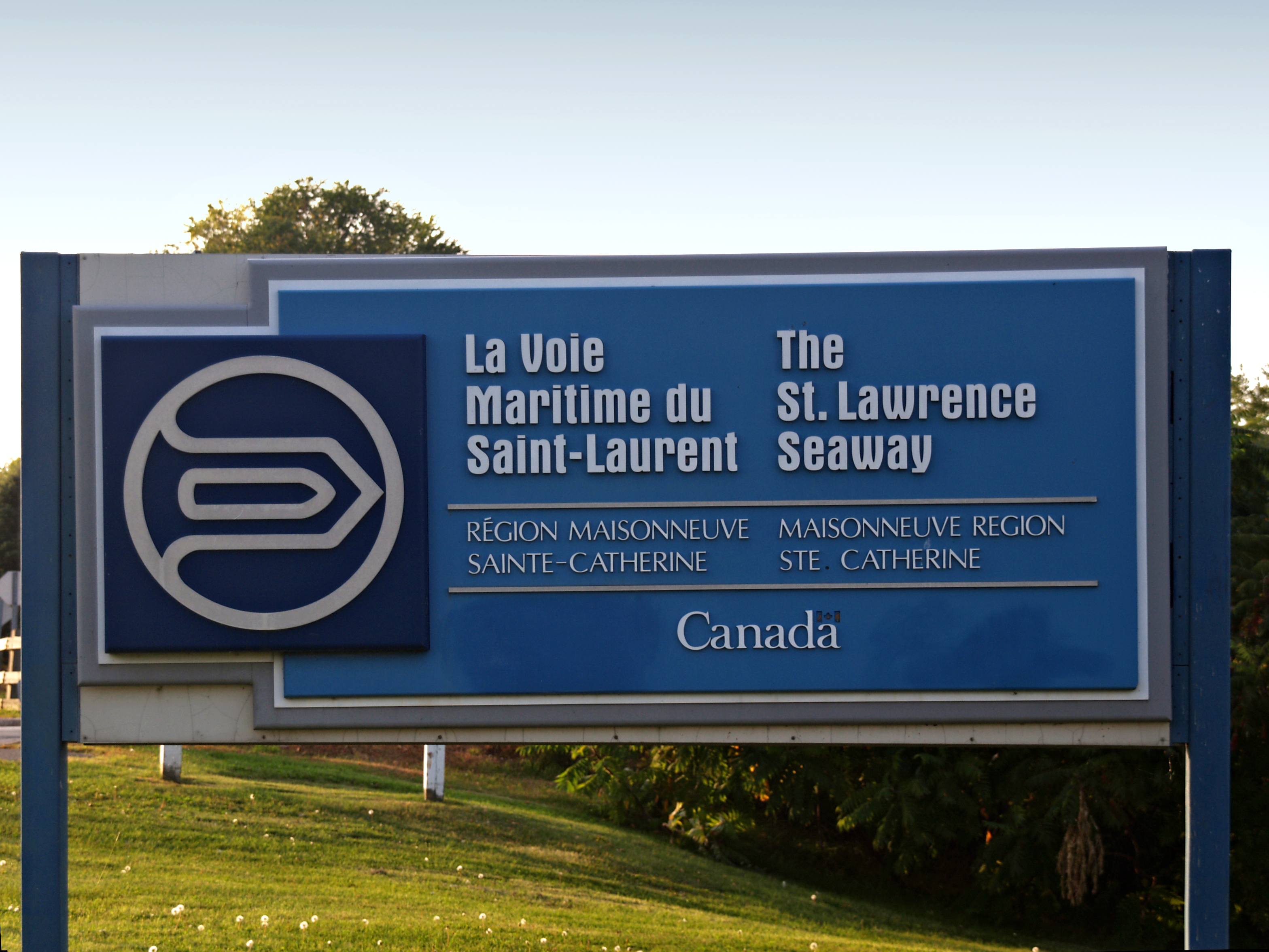 Sainte-Catherine (Québec) - Panneau Voie maritime du Saint-Laurent